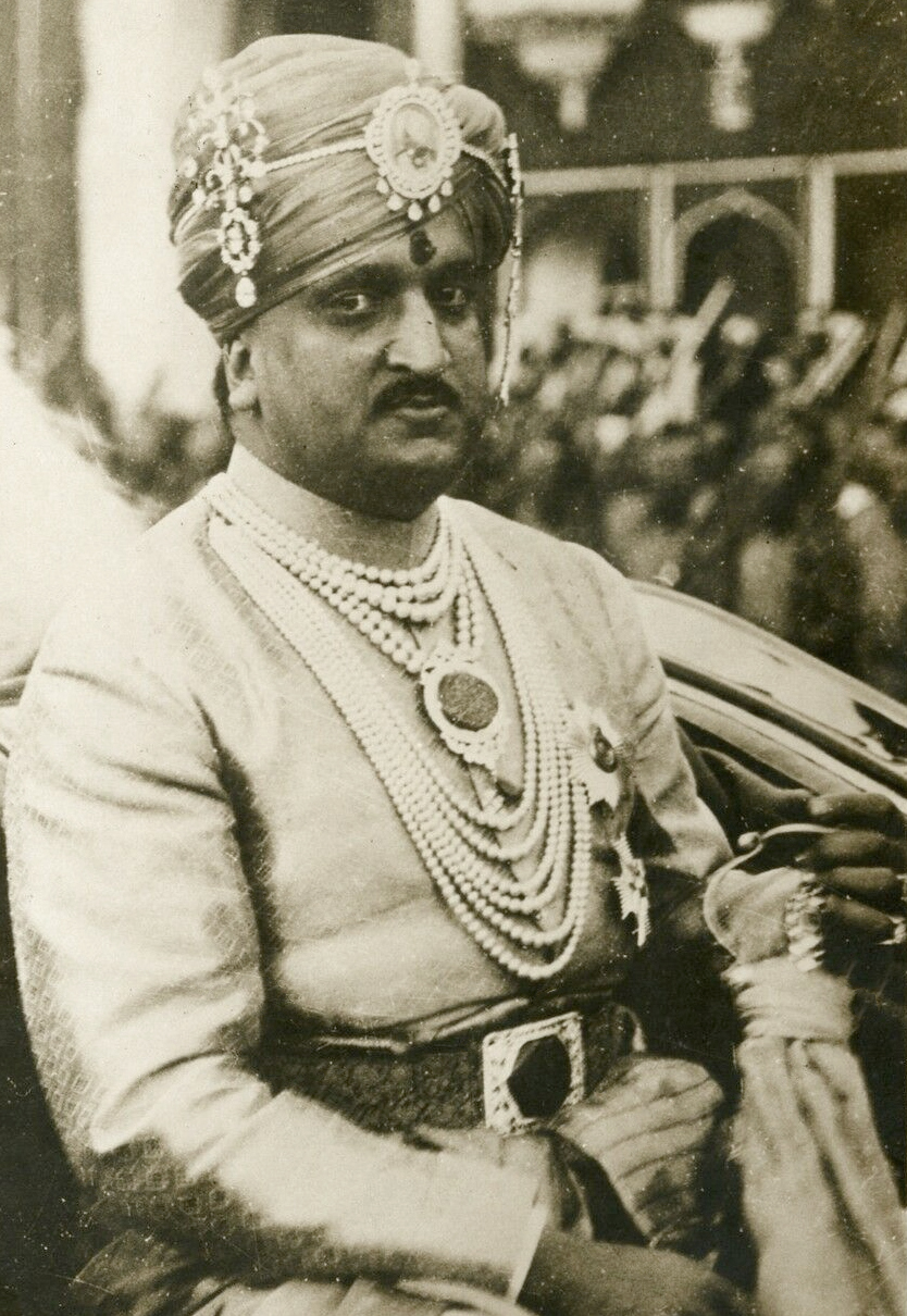 "Hara SINGH Marajah du CACHEMIRE 1931" Photo originale G.DEVRED / Agce ROL